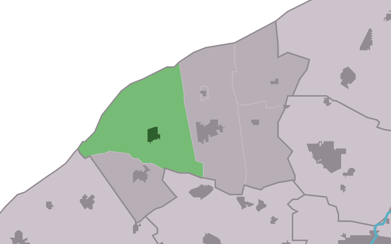 Kaartsje fan himrik fan Sint_Jabik